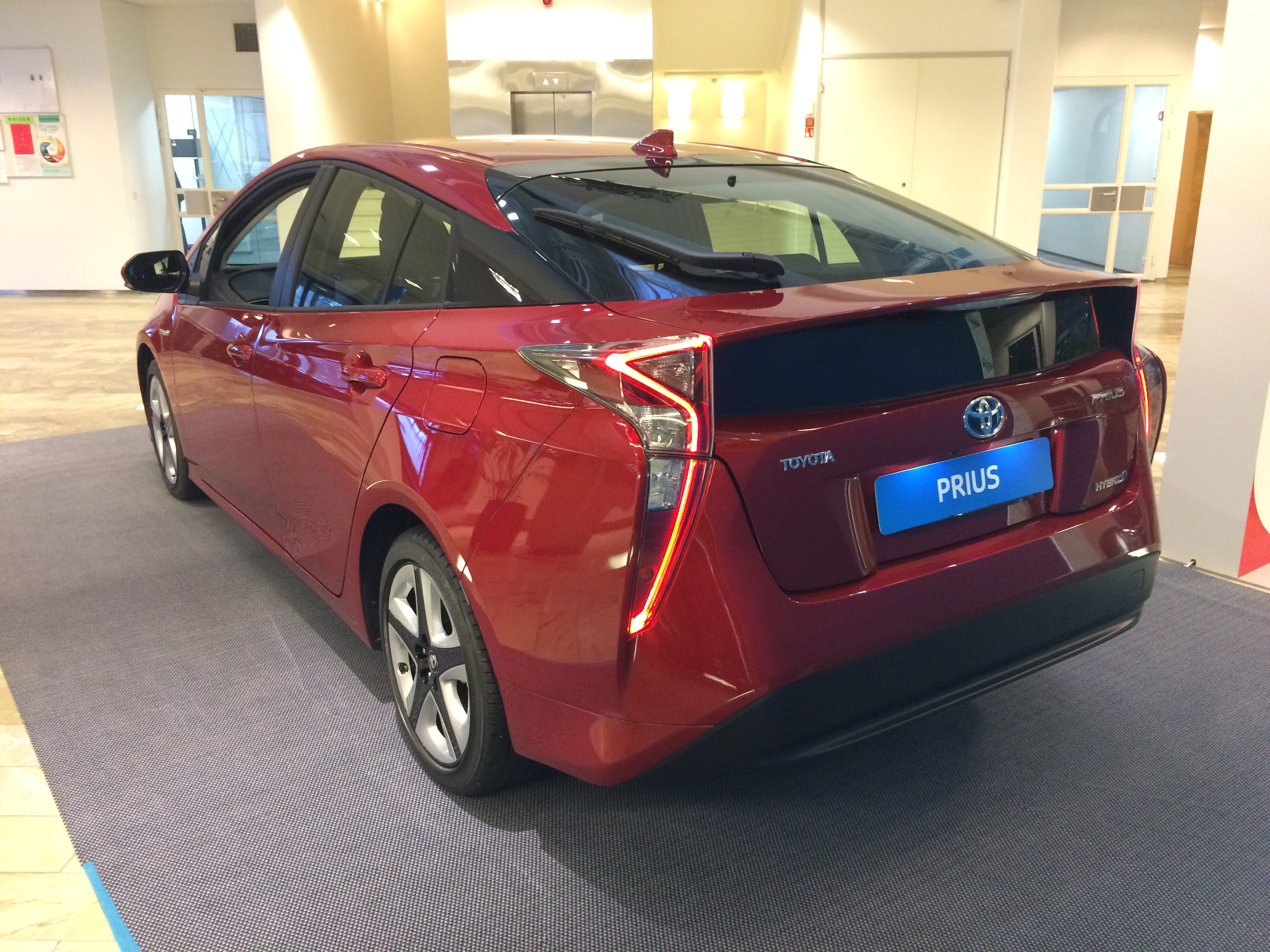 Toyota Prius 2016